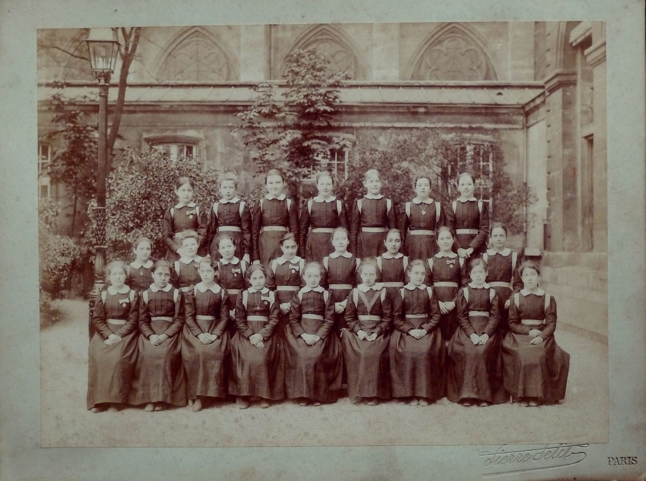 Maison d’Éducation de la Légion d'Honneur, abbaye royale de Saint-Denis (Saint-Denis, Seine-Saint-Denis), 1907. Groupe d'élèves, photo par Pierre Petit, cliché : 25 x 18,5 cm. Collection privée.